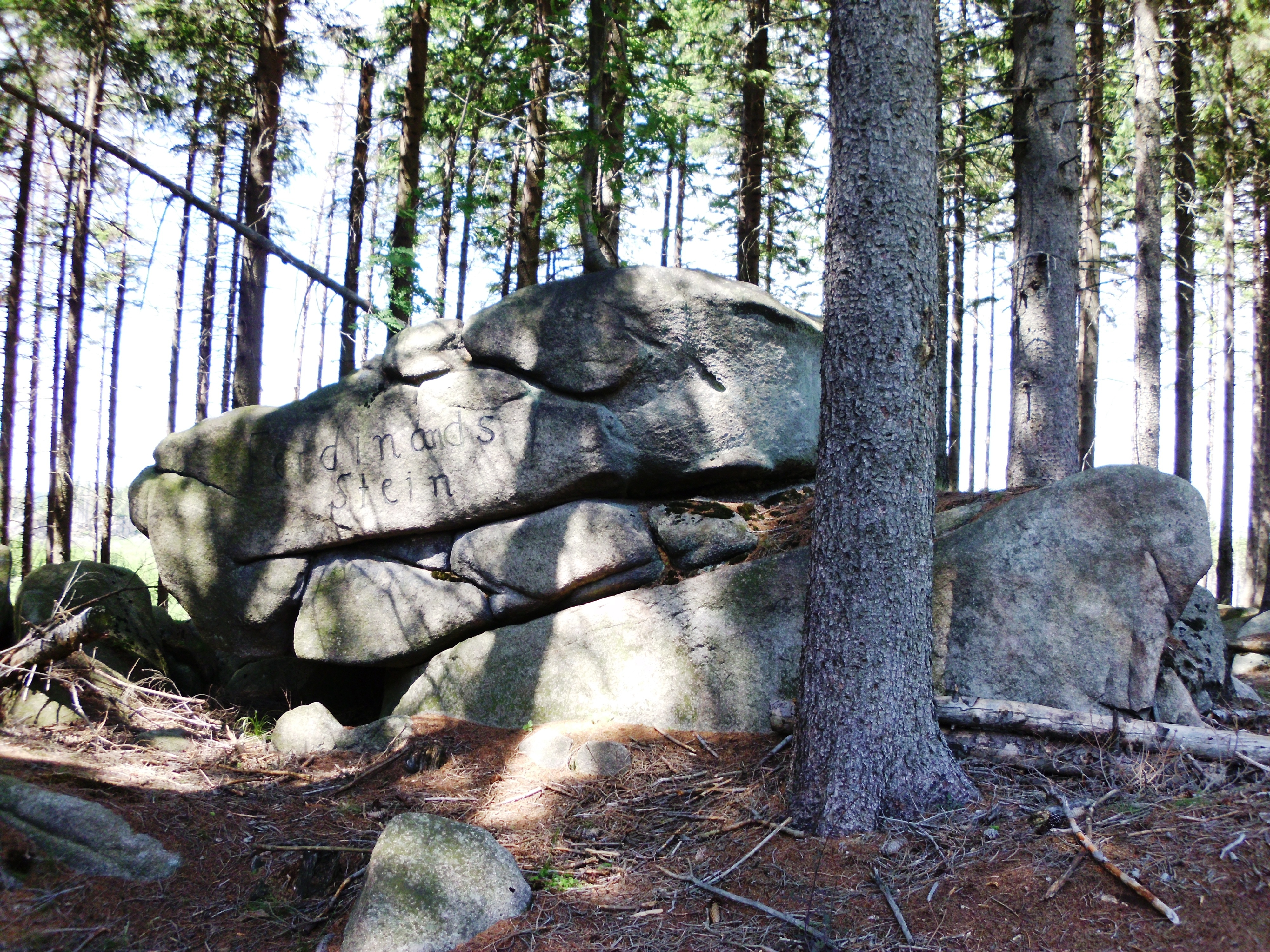 Ferdinandsstein, markanter Felsen im Nationalpark Harz